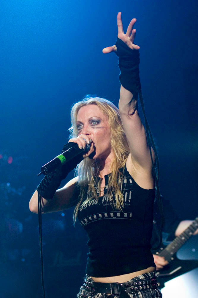 Angela Gossow from Arch Enemy, Via Funchal - São Paulo, Brasil